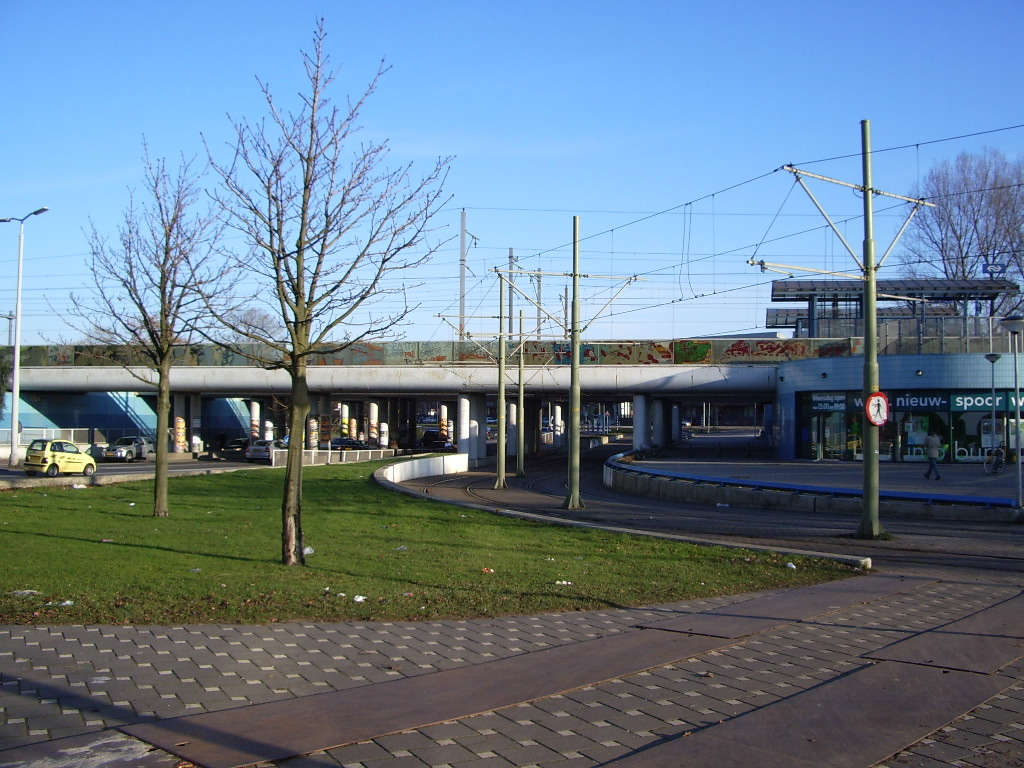 Station Den Haag Moerwijk (december 2005) Haag, den, Moerwijk